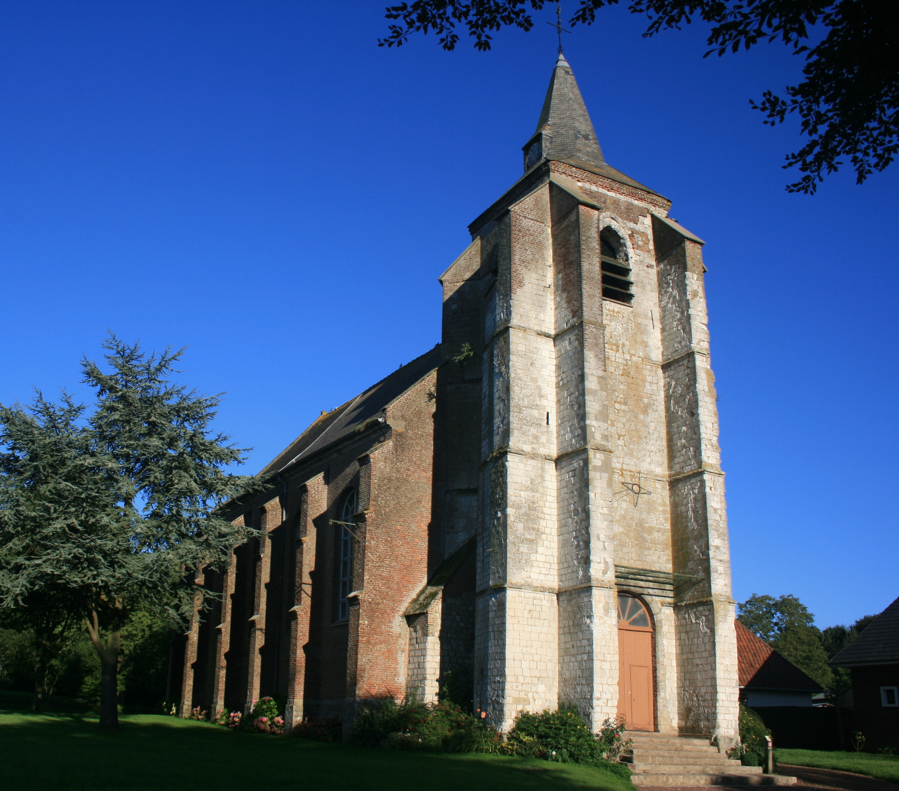 église St Jacques de Quoeux-Haut-Maisnil